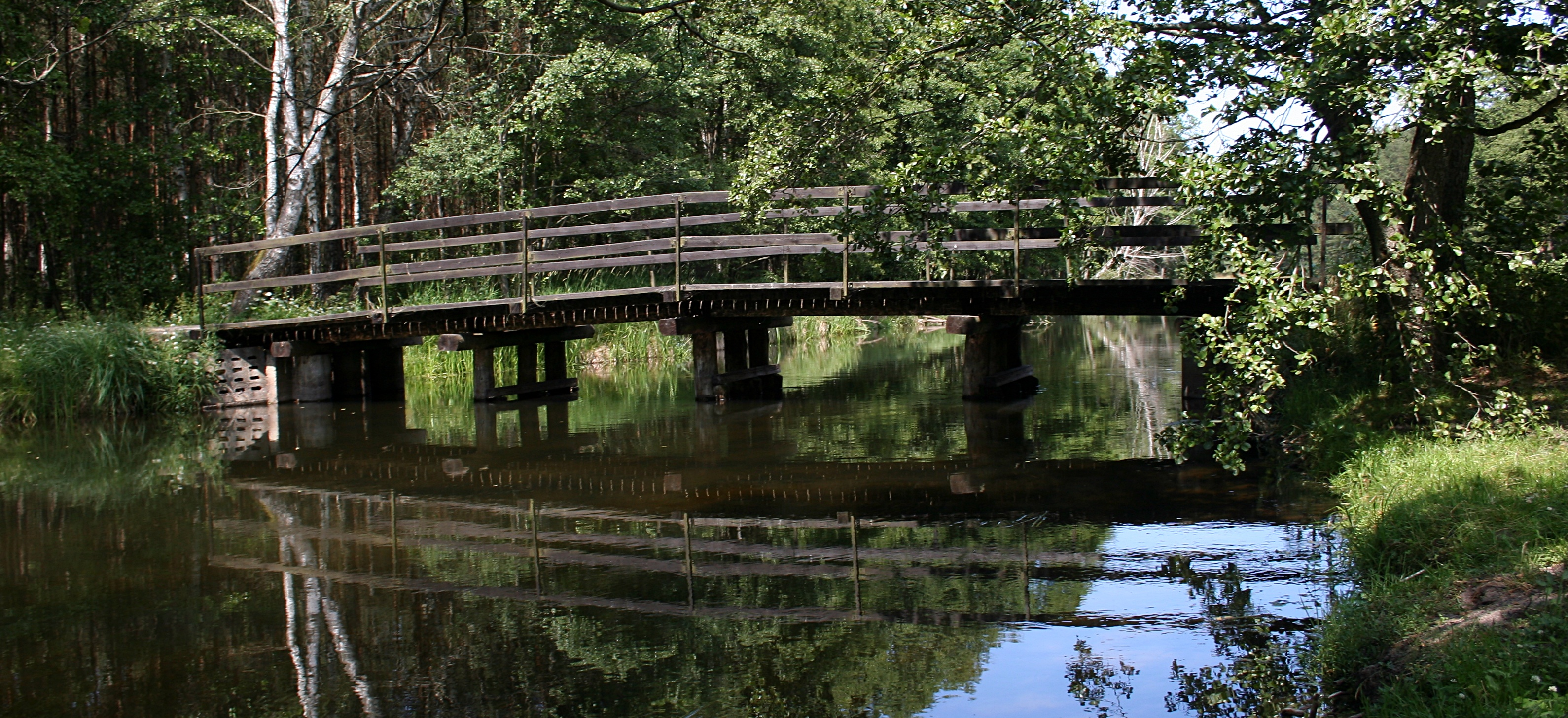 Wdzydzki Park Krajobrazowy, most na Wdzie na szlaku kaszubskim